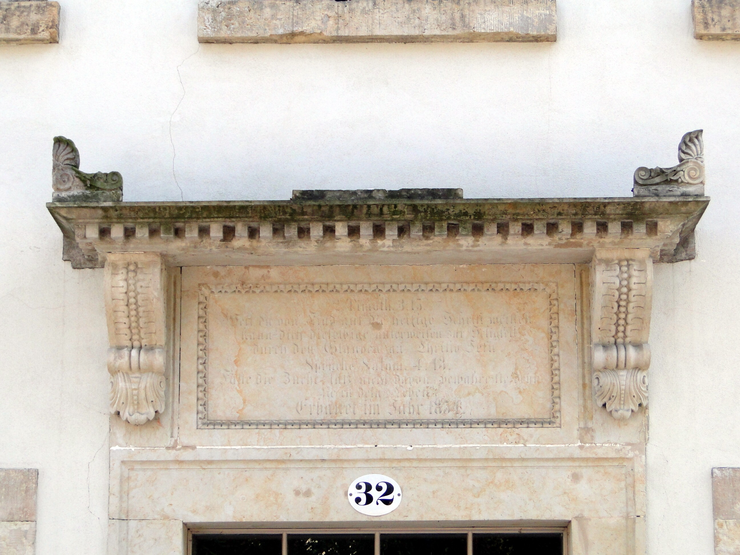 Die Alte Schule in Kaditz, Detail – Supraporte mit Inschrift